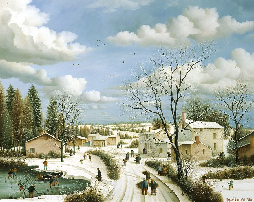 Par un beau matin d'hiver du peintre français Raphaël Toussaint. H.S.B. 50x65 et datée 1988.